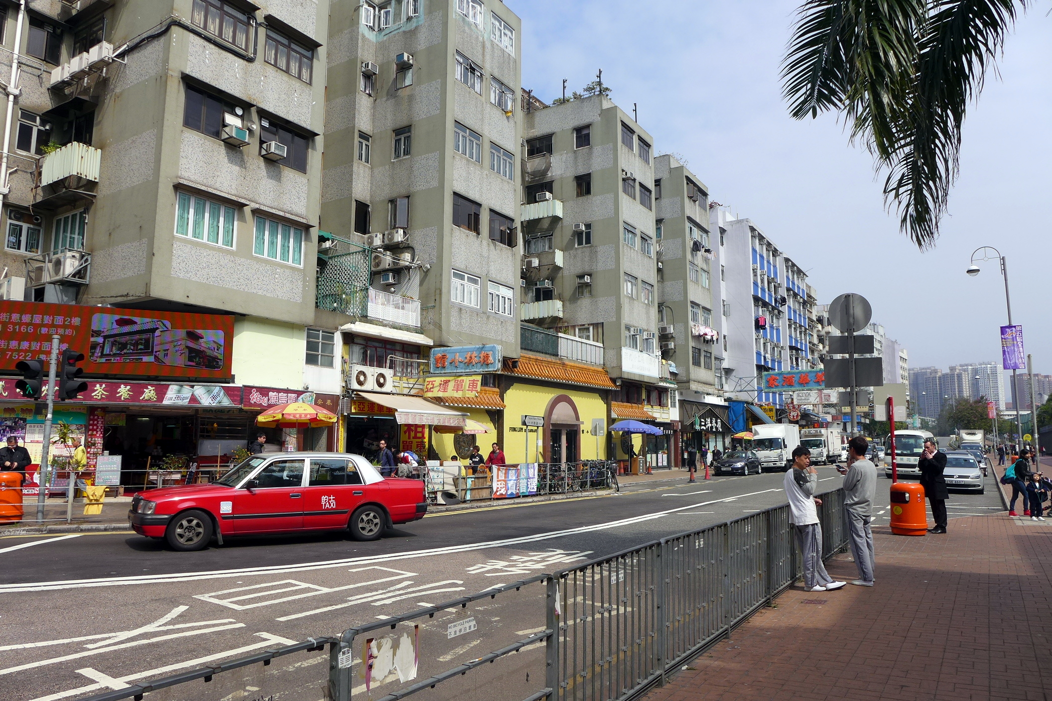 Tai Wai Hui Buildings